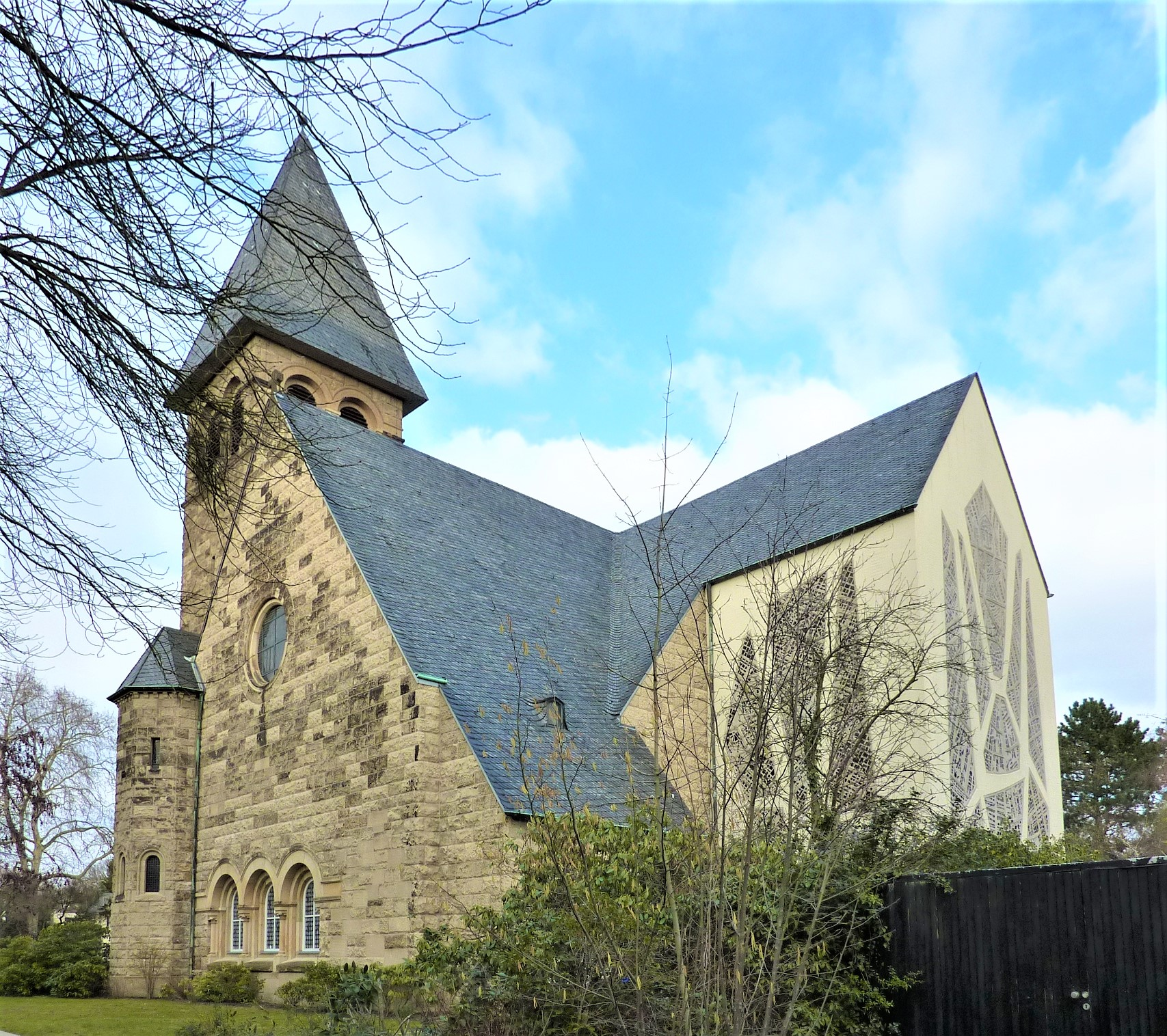 Reformationskirche Köln-Bayenthal